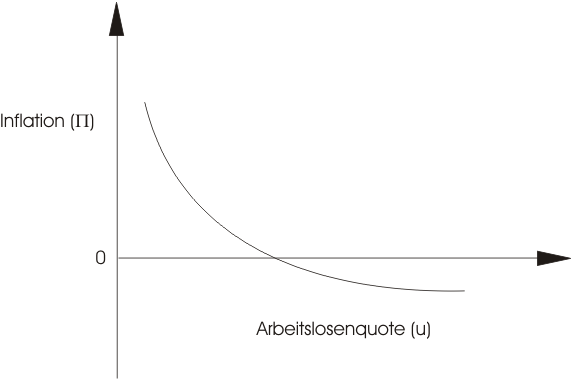 Das Bild zeigt den tendenziellen Verlauf der Phillipskurve in den USA 1900-1960 mit Ausnahme der Jahre 1931-1939.